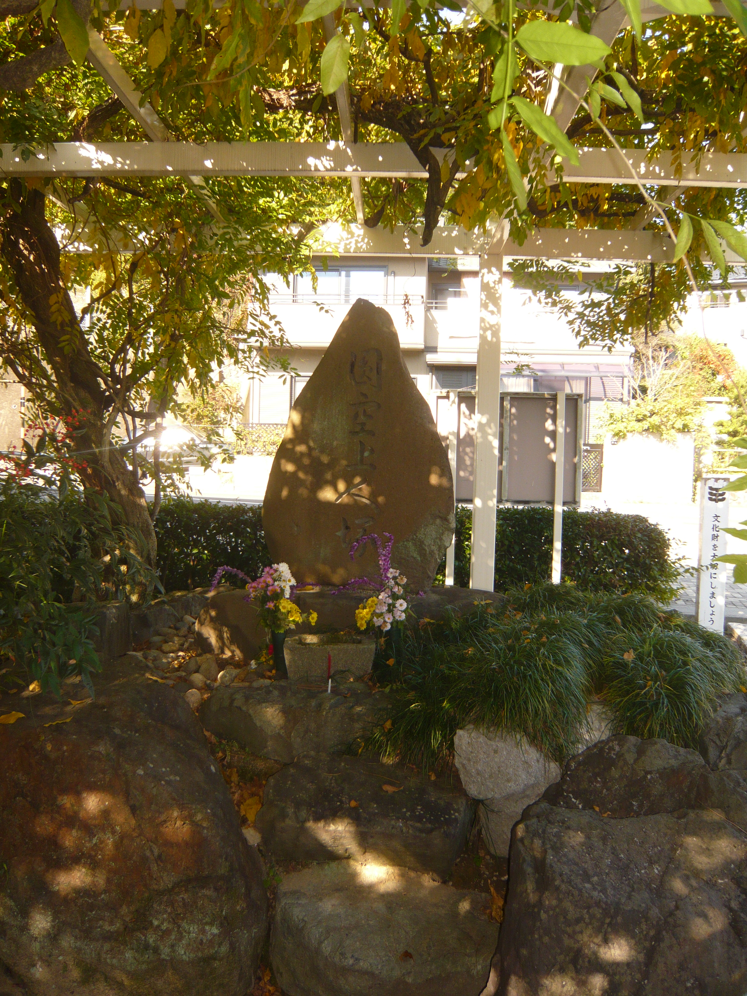 Enku's Burial Mound 円空入定塚（円空入定塚）,Seki,Gifu,Japan（岐阜県関市）で撮影。